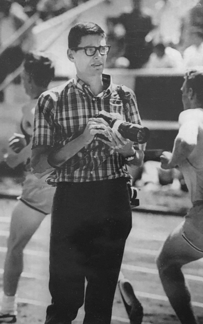 ORIG 1966 JIM RYUN, EAST H.S. WICHITA, KANSAS MILE RECORD HOLDER WIRE PHOTOGRAPH